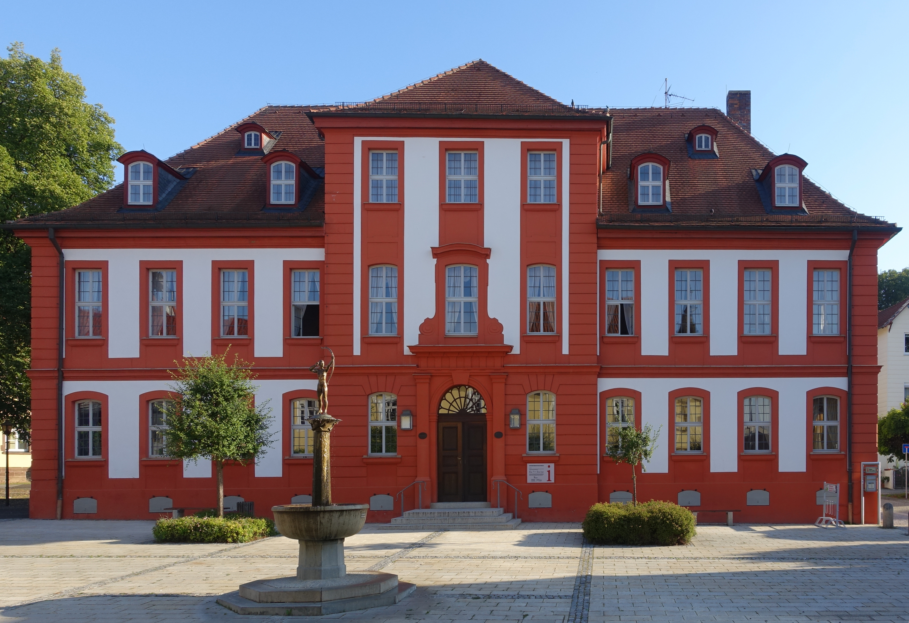 Blick auf das ehemalige Jagdschloss